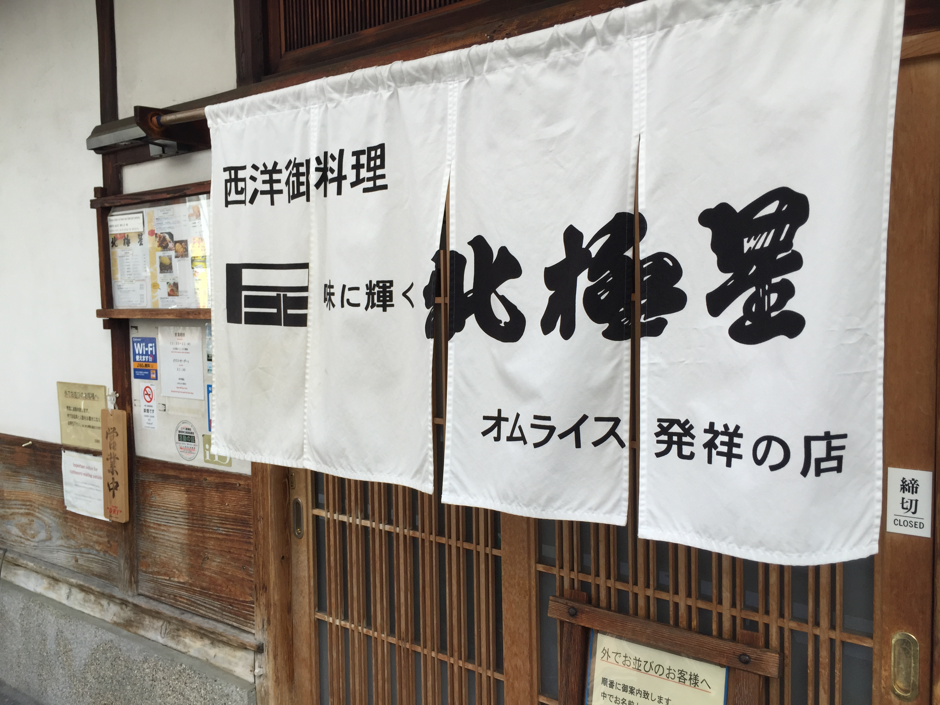 大阪 北極星心斎橋本店